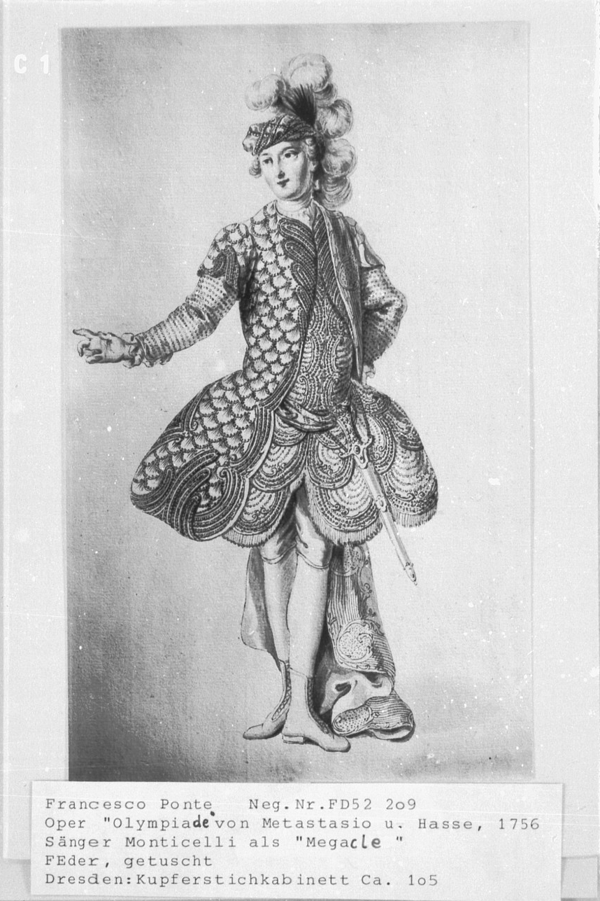 Der Sänger Monticelli als Megacle in Hasses Oper L’Olimpiade. Federzeichnung?